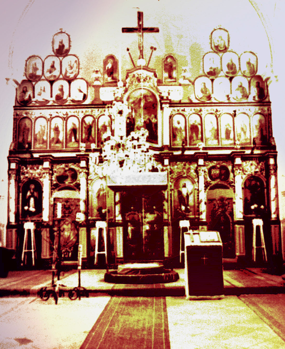 Ikonostas Pravoslavne crkve u Kulpinu